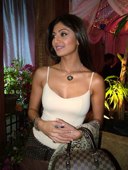 Shilpa Shetty